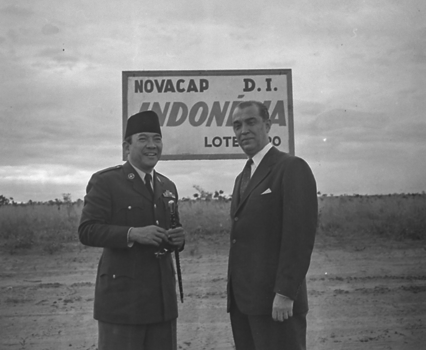 Imagem do Fundo Agência Nacional, do Arquivo Nacional